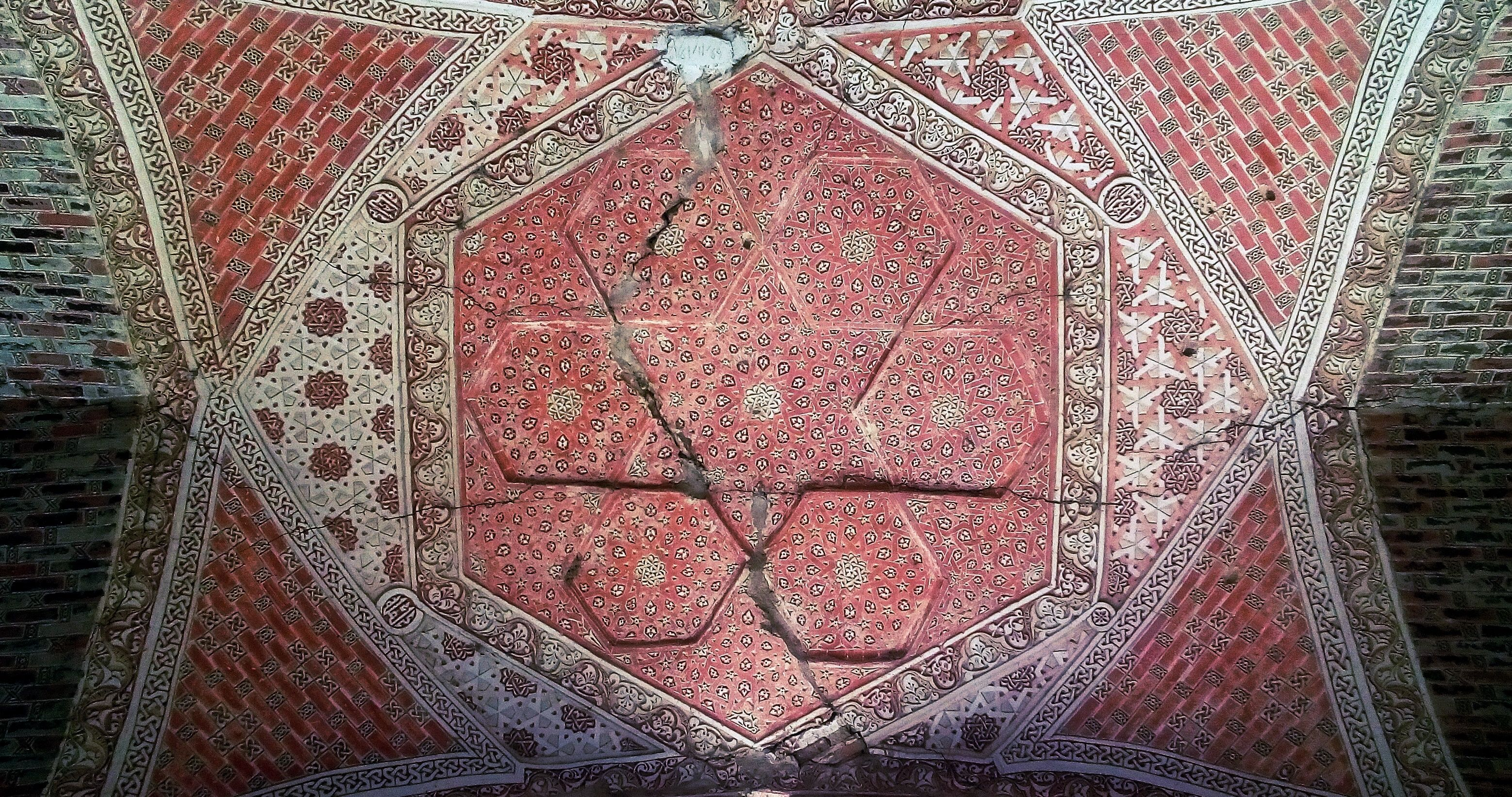 مقبره سلطان محمد خدابنده الجایتو